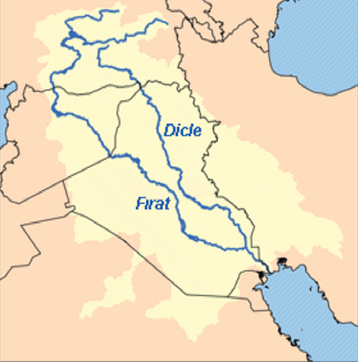 Commons:Image:Tigr-euph.png'nin türkçeleştirilmiş sürümü Üreten: Karl Musser